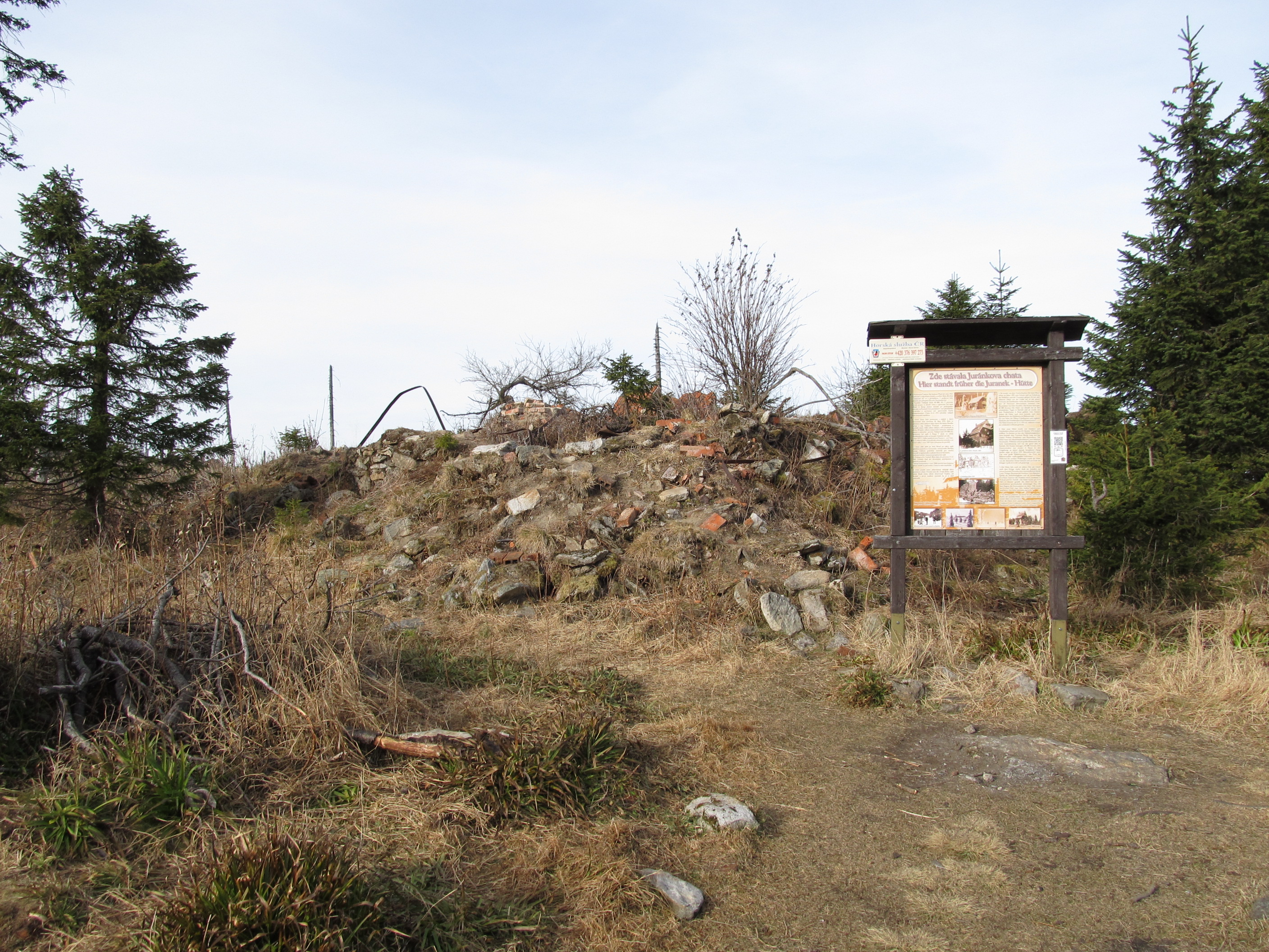 Svaroh - zbytek Juránkovy chaty